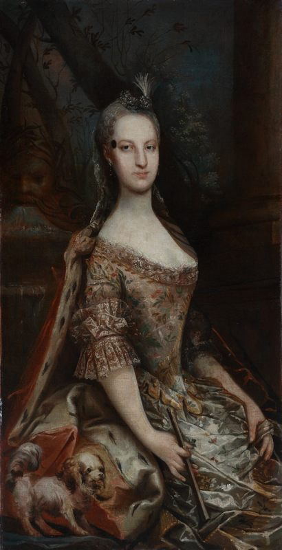 Portret Elżbiety z Mniszchów Wielopolskiej